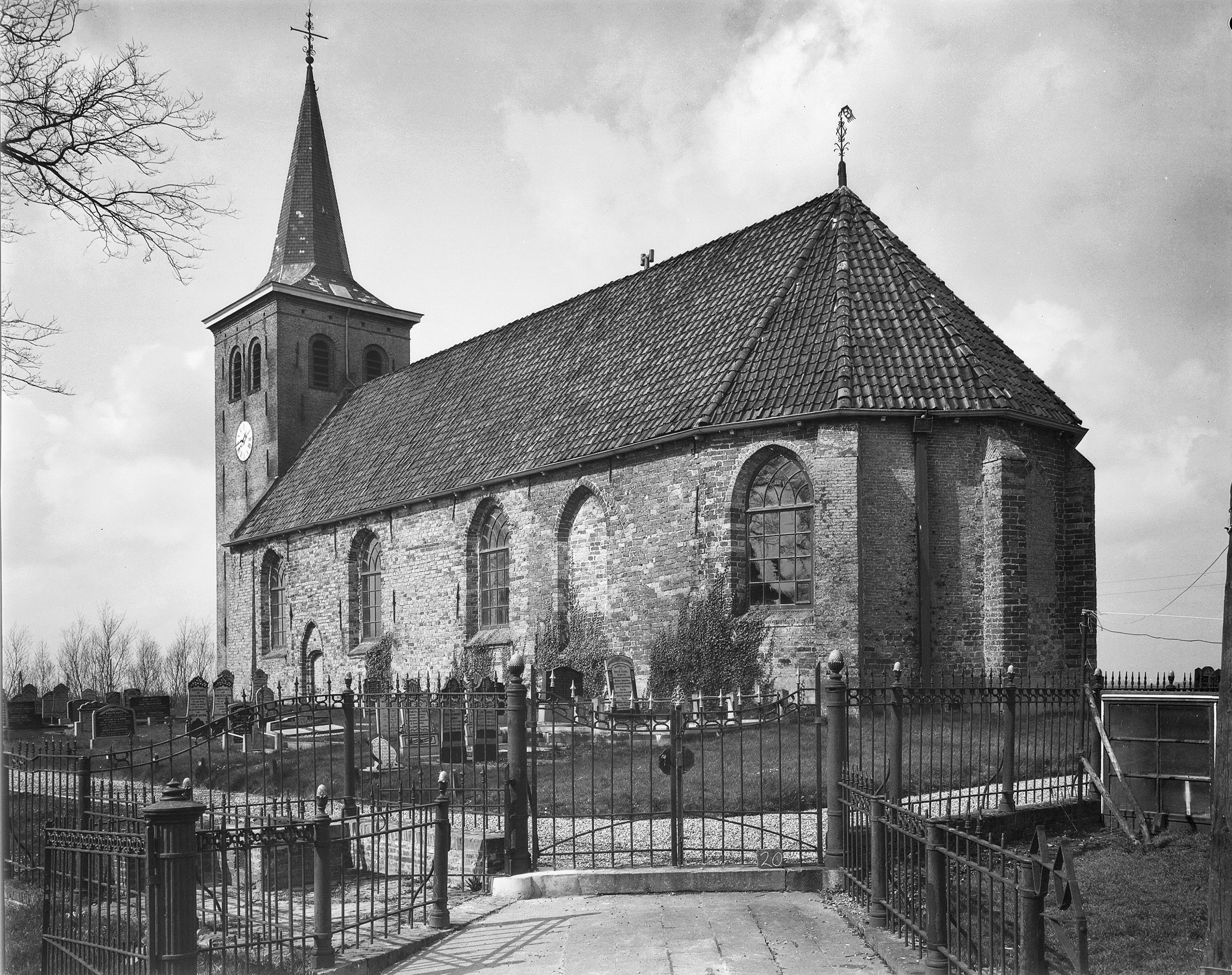 N.H.Kerk: exterieur naar het noord-westen